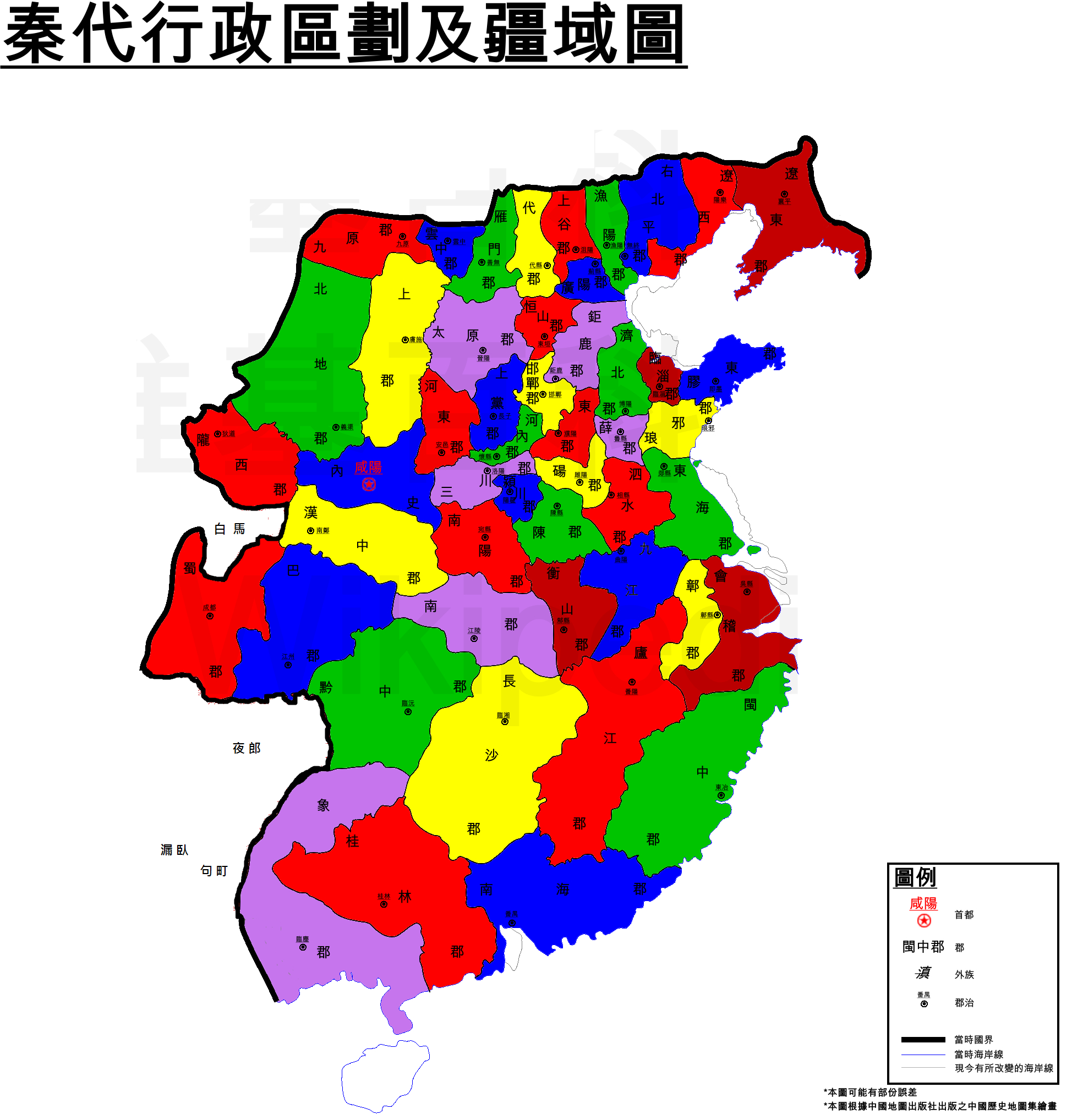 秦代行政區劃